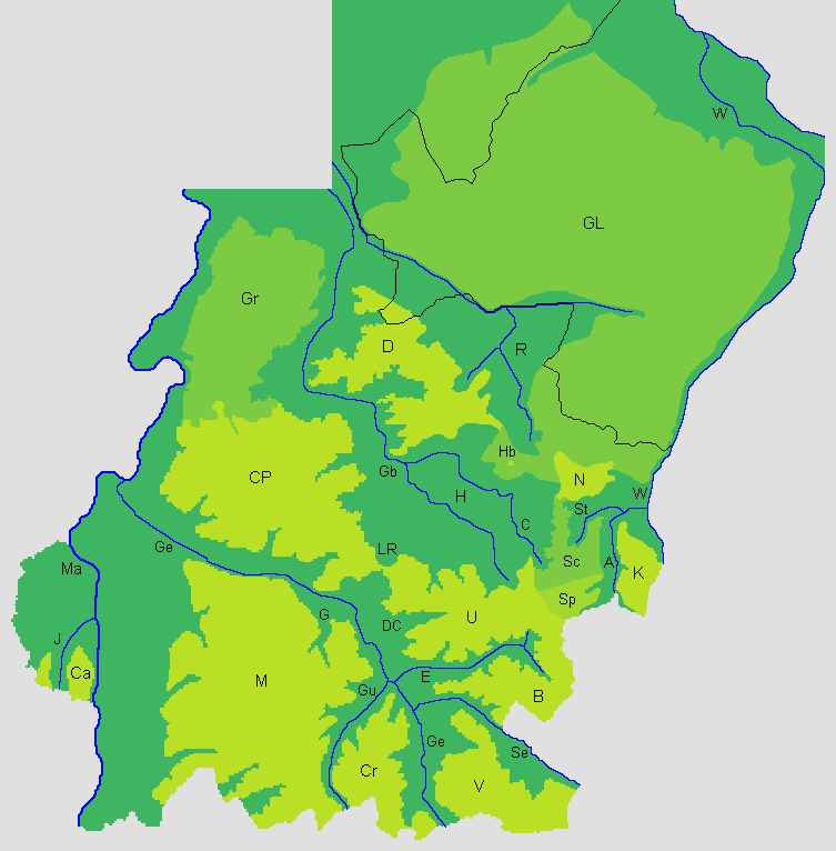 Kaart met plateaus en dalen van Nederlands Zuid-Limburg en het Geilenkirchener Lehmplatte Legenda: B Plateau van BocholtzCa Plateau van CaestertCP Centraal PlateauCr Plateau van CrapoelD Plateau van DoenradeGL Geilenkirchener LehmplatteGr Plateau van GraetheideHb HeksenbergK Plateau van KerkradeM Plateau van MargratenN Plateau van NieuwenhagenS Plateau van SpekholzerheideU Plateau van UbachsbergV Plateau van Vijlen A AnstelerbeekC CaumerbeekDC Droogdal van ColmontE EyserbeekG GerendalGb GeleenbeekGe GeulGu GulpH Bekken van HeerlenJ JekerMa MaasR Bekken van de Roode BeekSe SelzerbeekSt StrijthagerbeekW Worm